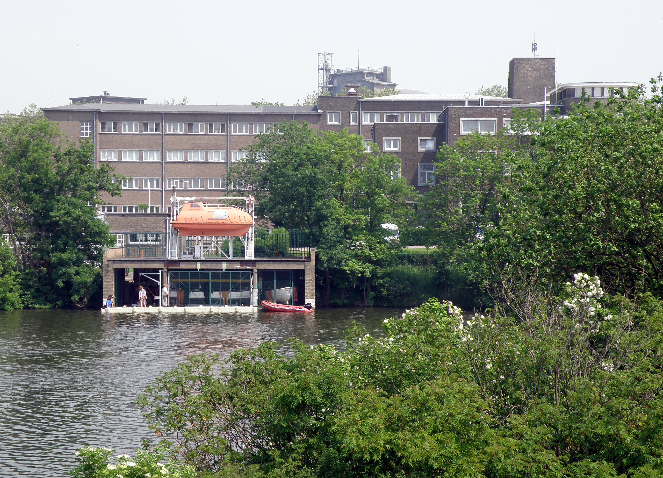 Antwerpen, België. Hogere Zeevaartschool, schoolgebouw van 1931-33, gelegen nabij het zog. Noordkasteel ten noordwesten van de stad, opgetrokken in Nieuwe Zakelijkheid, n.o.v. de Brusselse architecten J. Van Kriekinge en zoon. Achtergevel van de noordvleugel en oefenreddingsboot aan de rand van de vroegere vestinggracht.